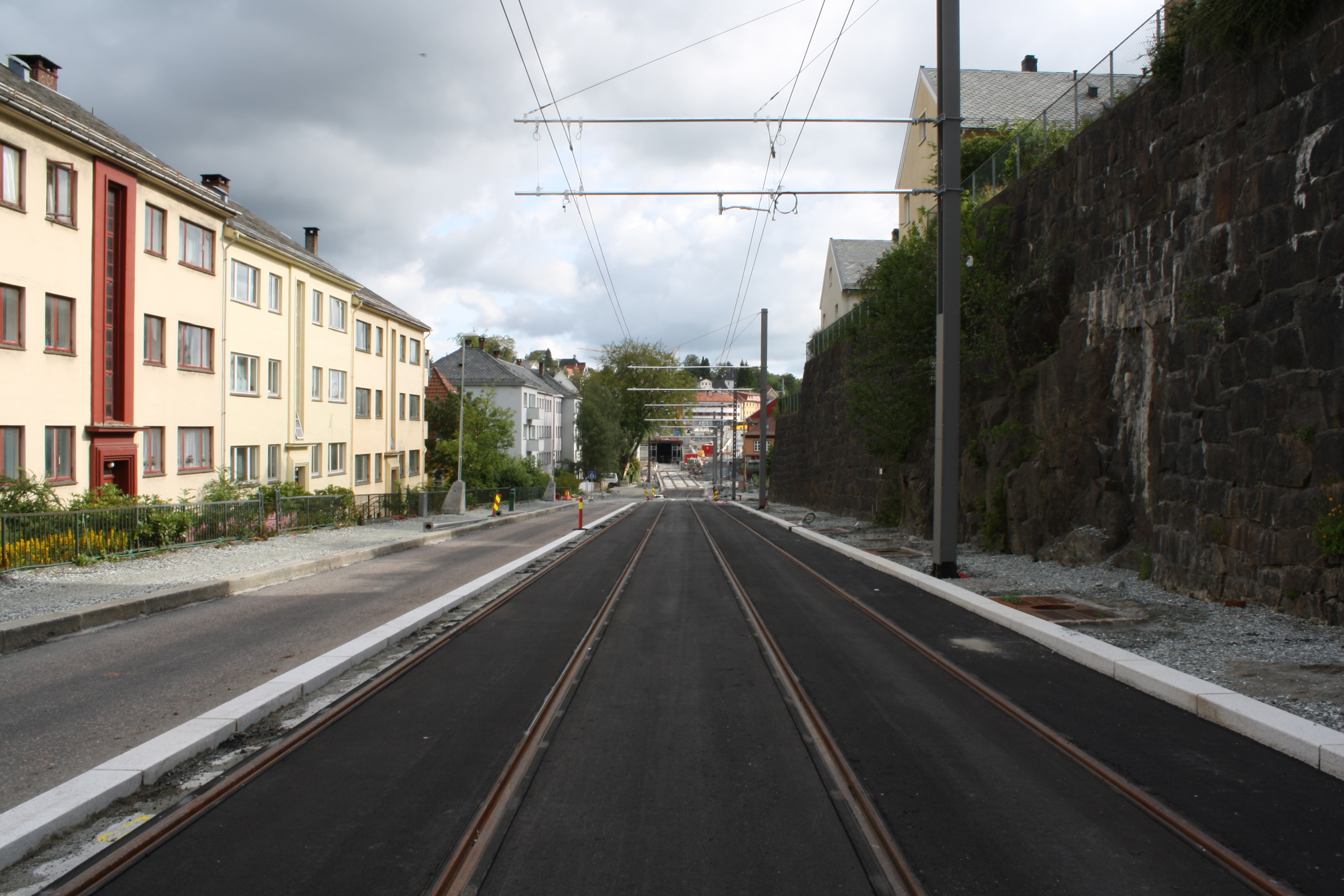 Bybanespor like nord for Wergeland holdeplass.